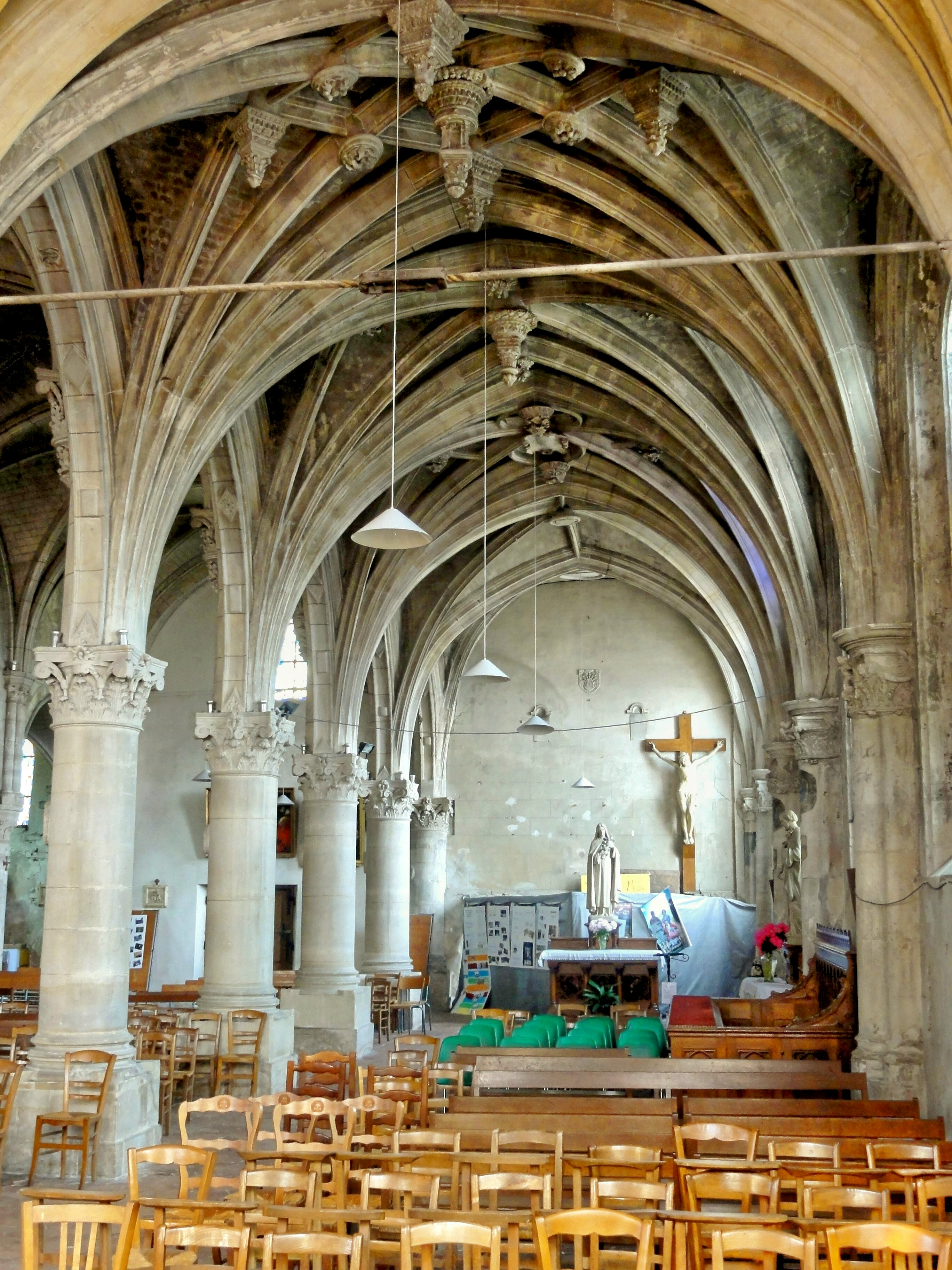 Collatéral nord, vue vers l'ouest.